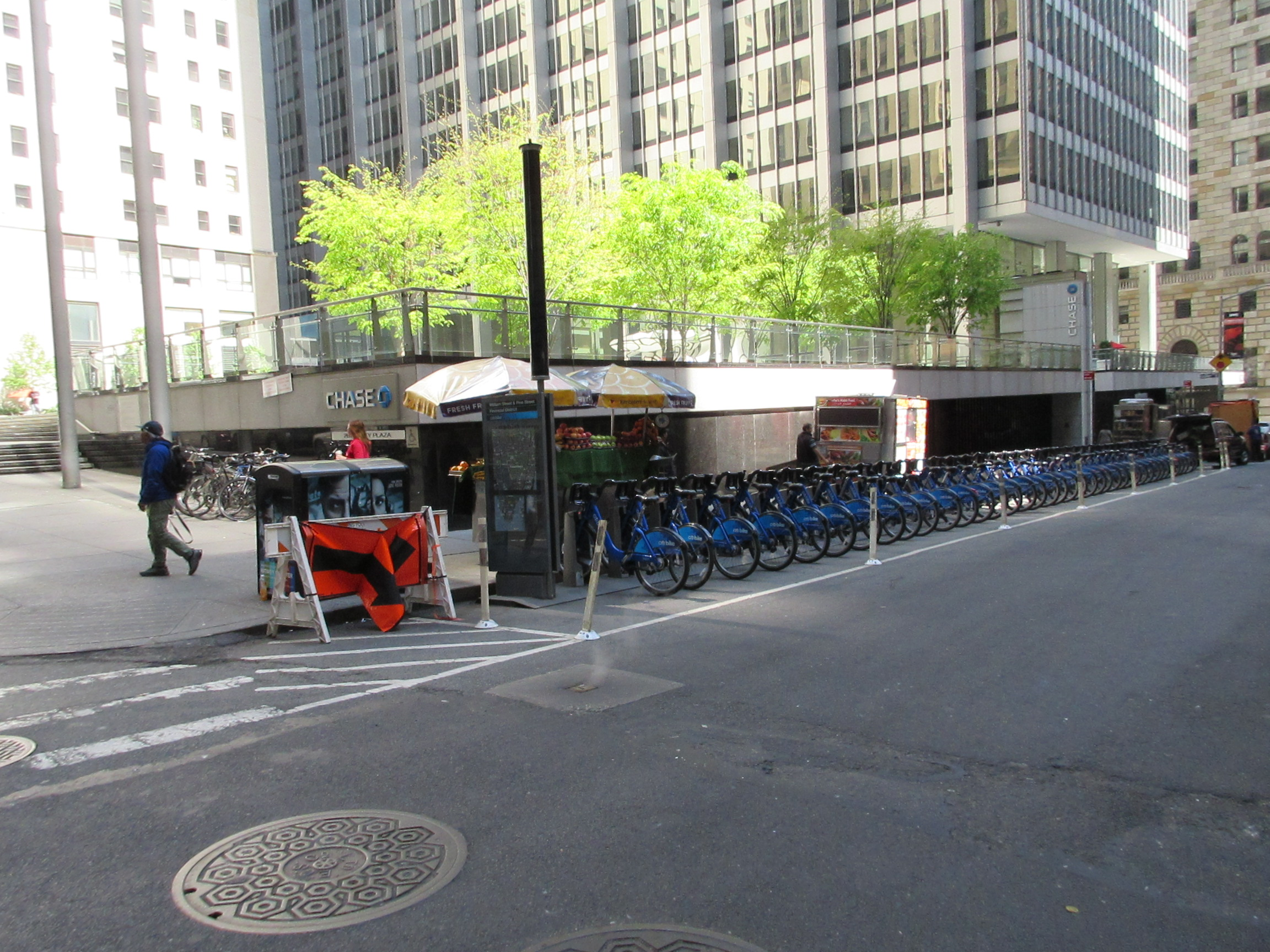 New York